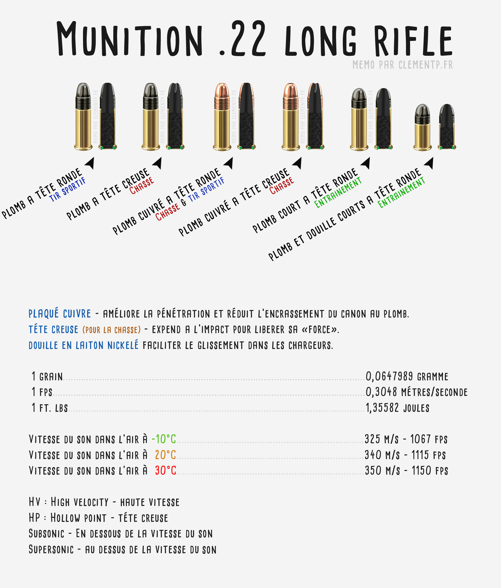 tableau d'information résumer sur le 22LR